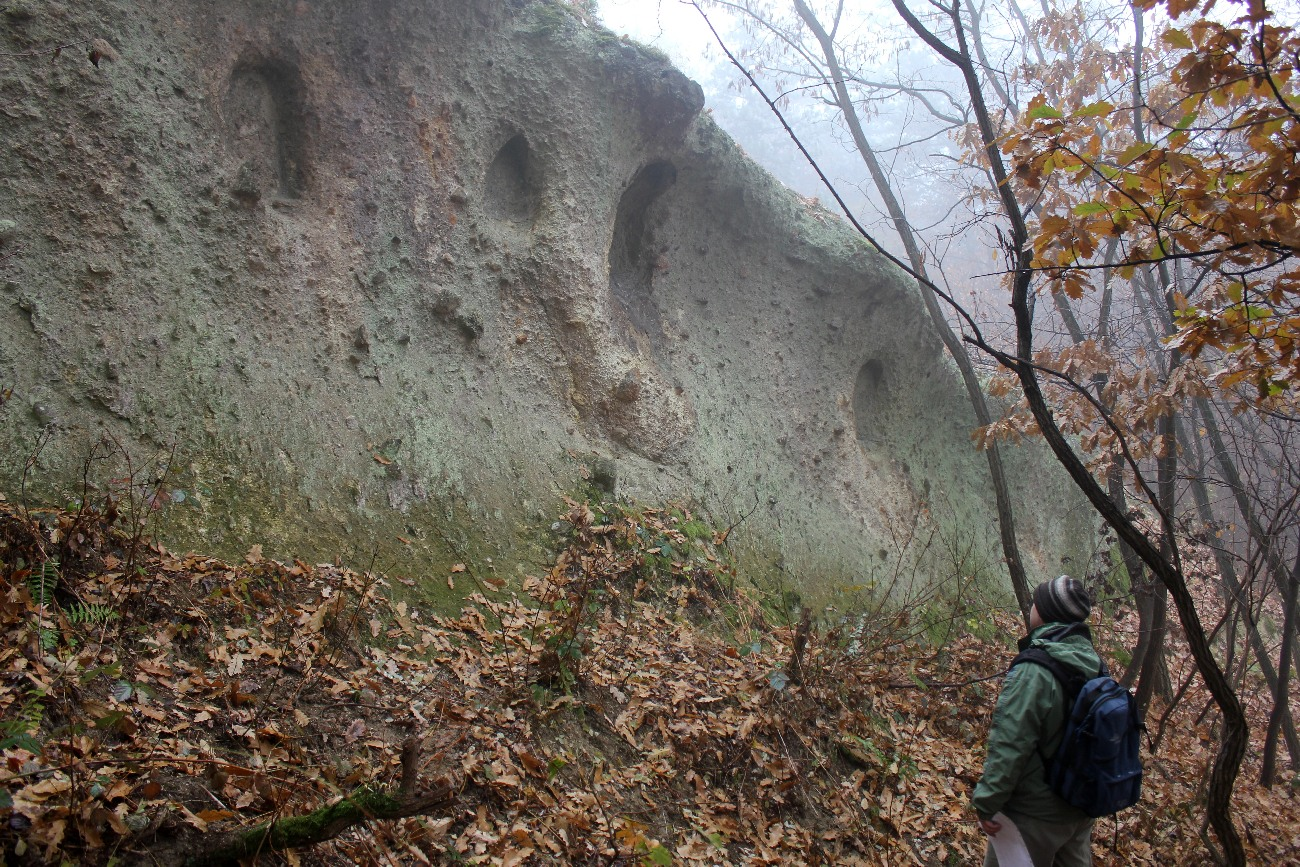 H2b, Eger, Mész-völgy